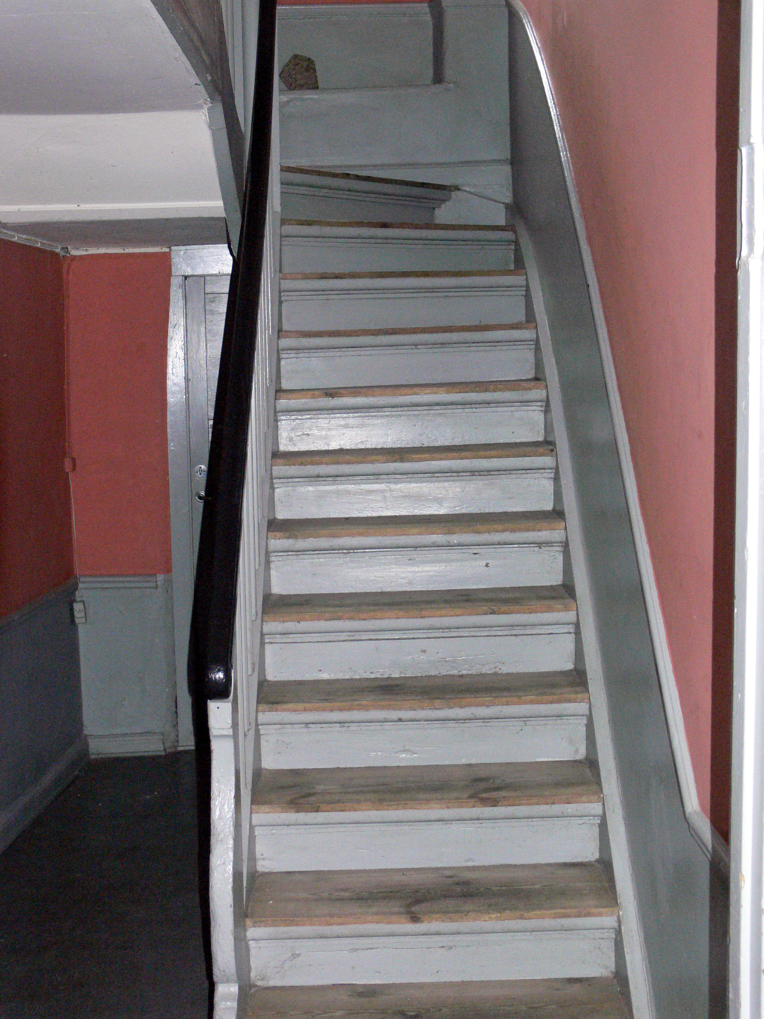 St. Pedersgade 22 in Kopenhagen. Hier stürtzte der isländische Dichter Jón Hallgrímsson und verletzte sich tödlich.